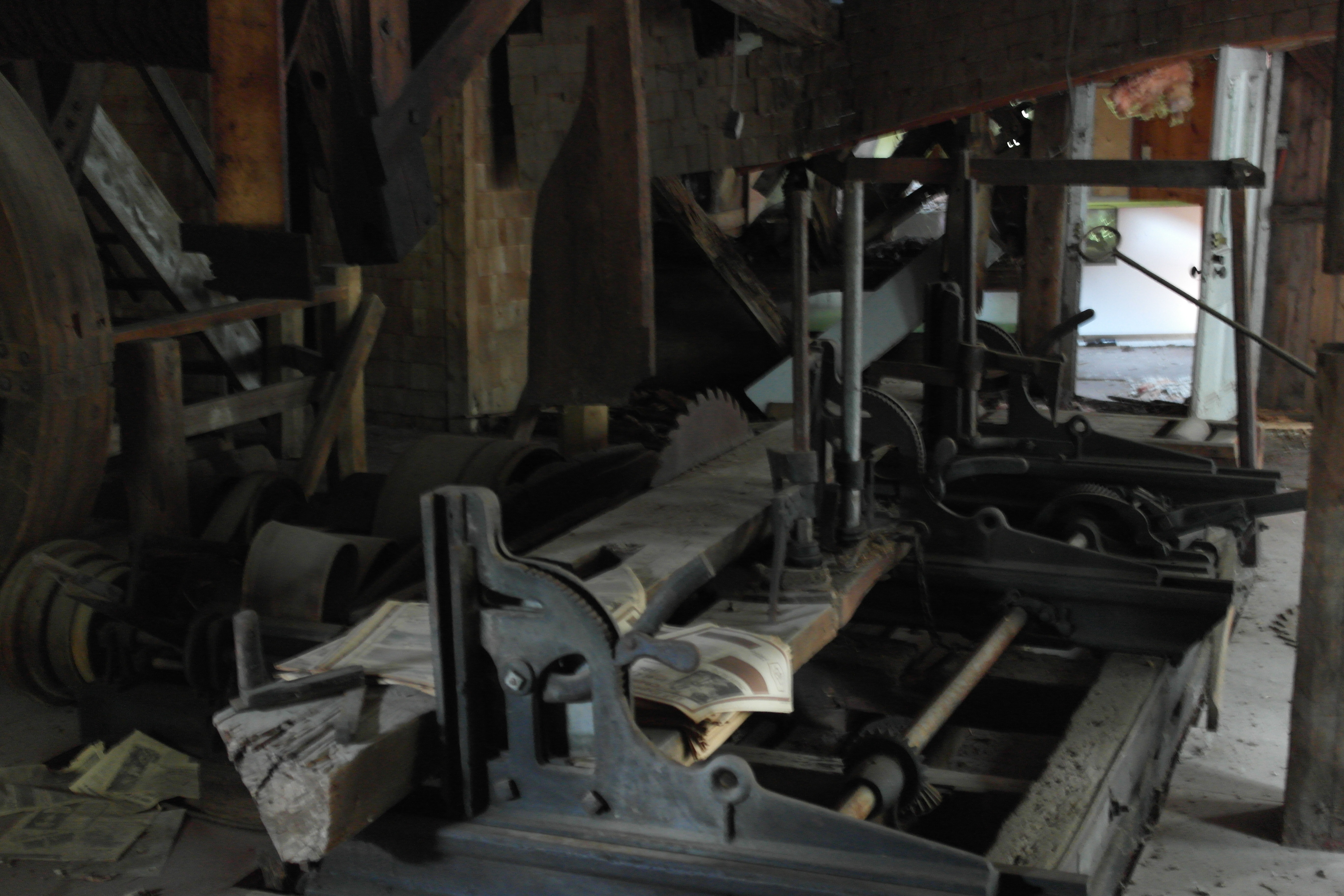 Le Moulin Gosselin (ex-moulin des arts Albert-Rousseau) de St-Étienne-de-Lauzon (Lévis). Vue de la machinerie à l'intérieur